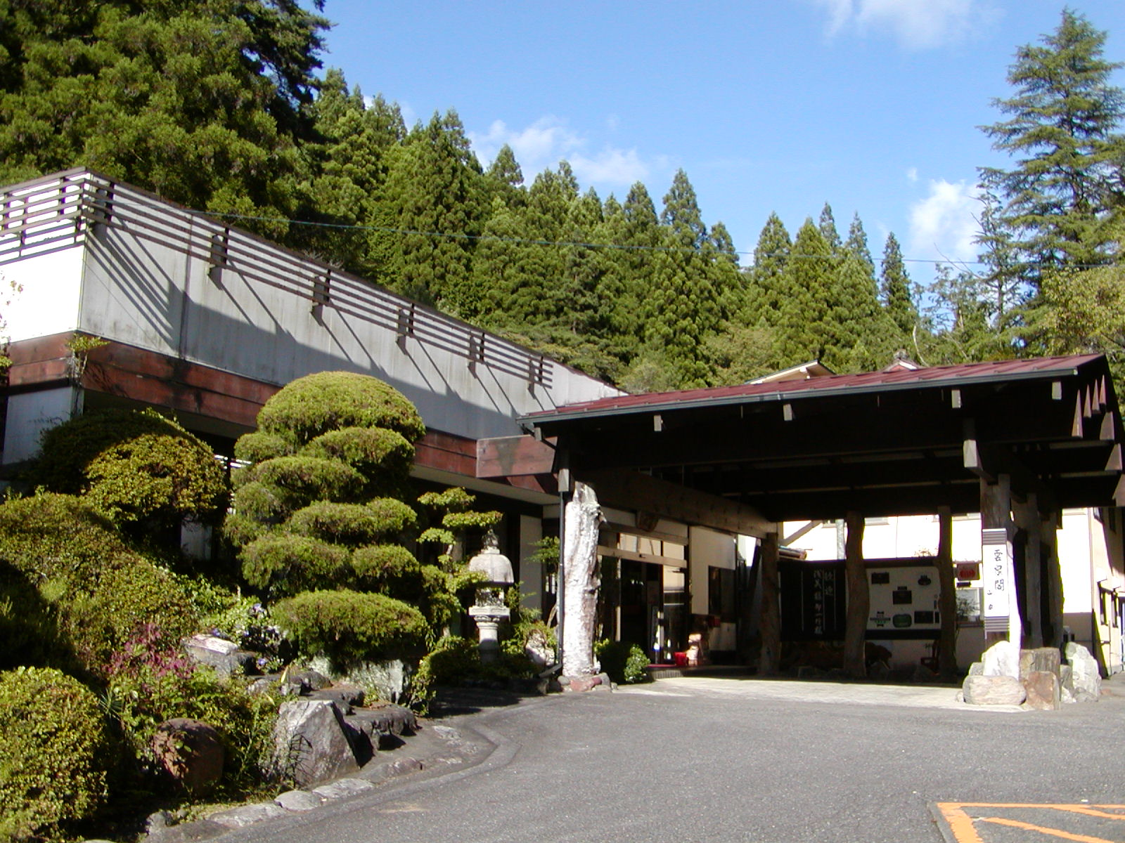 添沢温泉 山の家（愛知県設楽町）